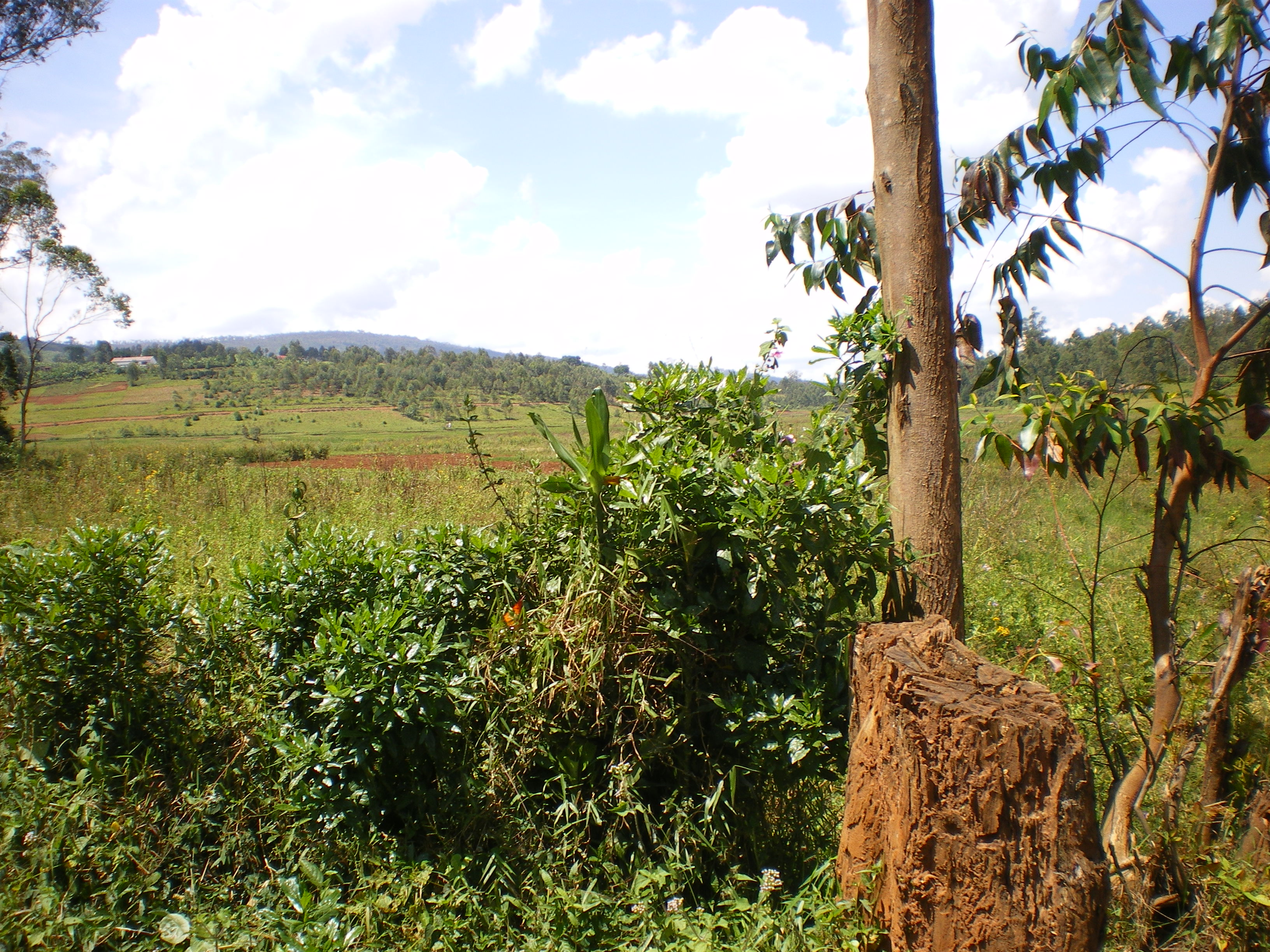 Kayanza province, Burundi (Hubert Schonberg)